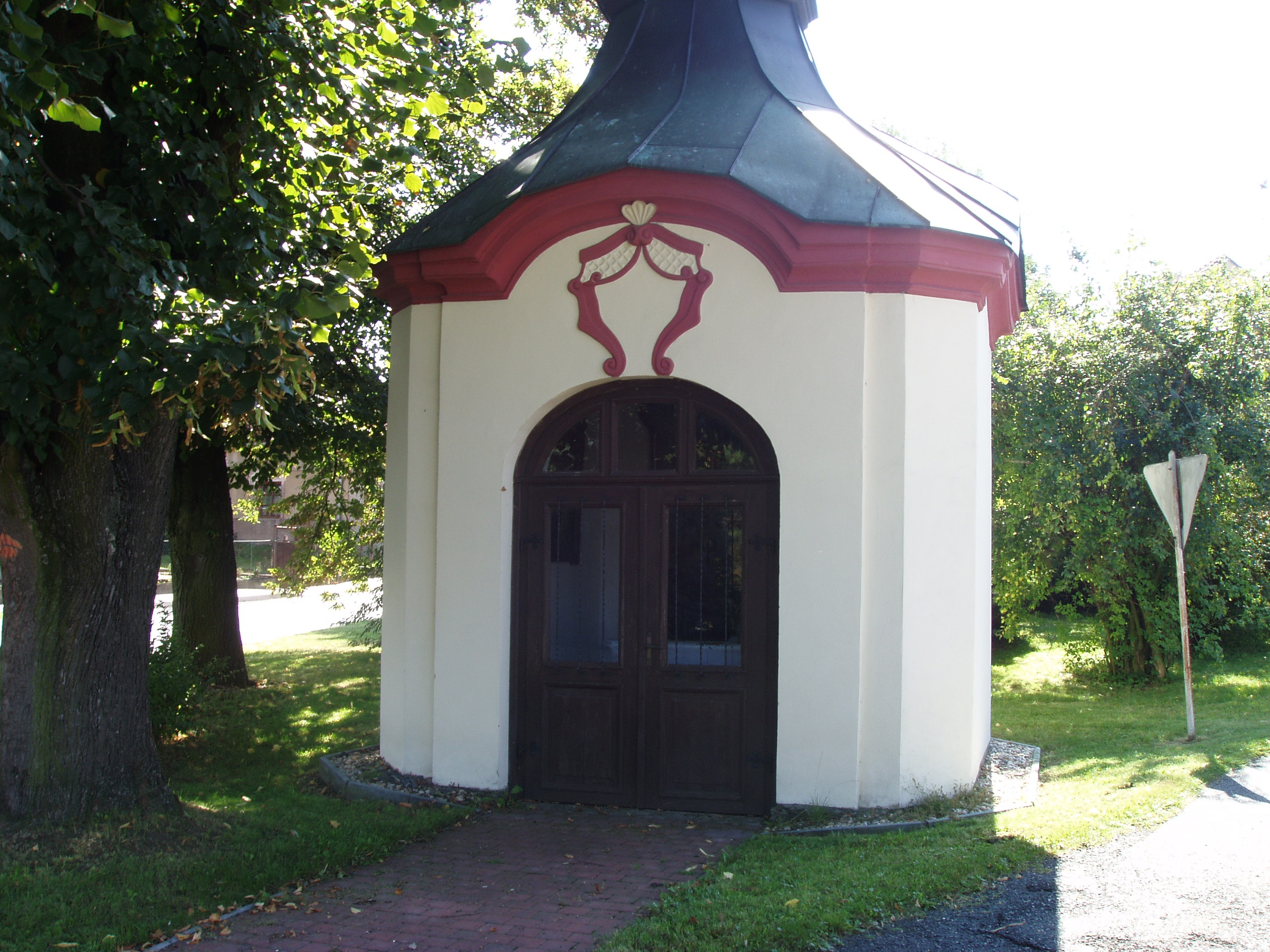 Kaplička sv. Jana Nepomuckého (Lošánky), náves, Lošánky